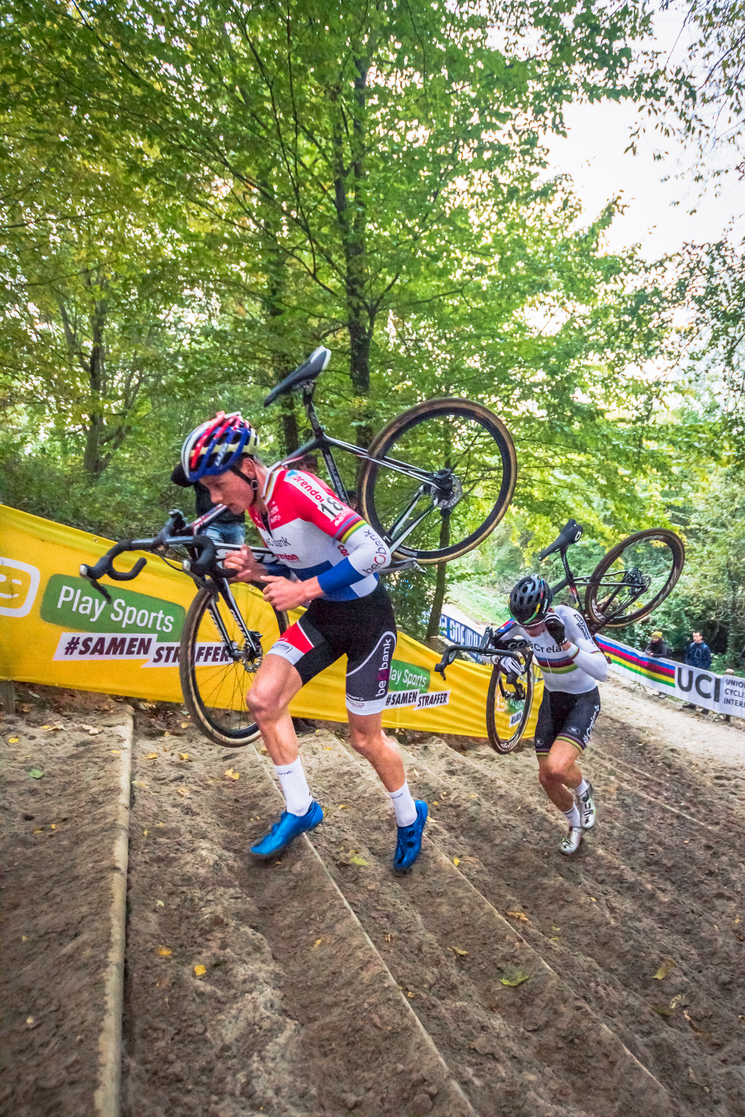 Mathieu van der Poel (NED) & Wout van Aert (BEL). UCI Cyclocross World Cup. Valkenburg, Netherlands, 2016.